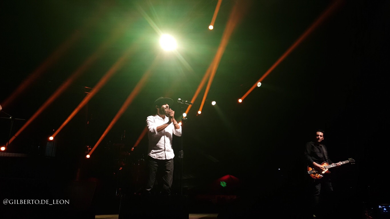 Bohemia Suburbana en concierto por sus 25 años en Quetzaltenango, Guatemala, cuyo evento se llevó a cabo en el centro intercultural de dicha localidad, llevando por nombre #BS25años